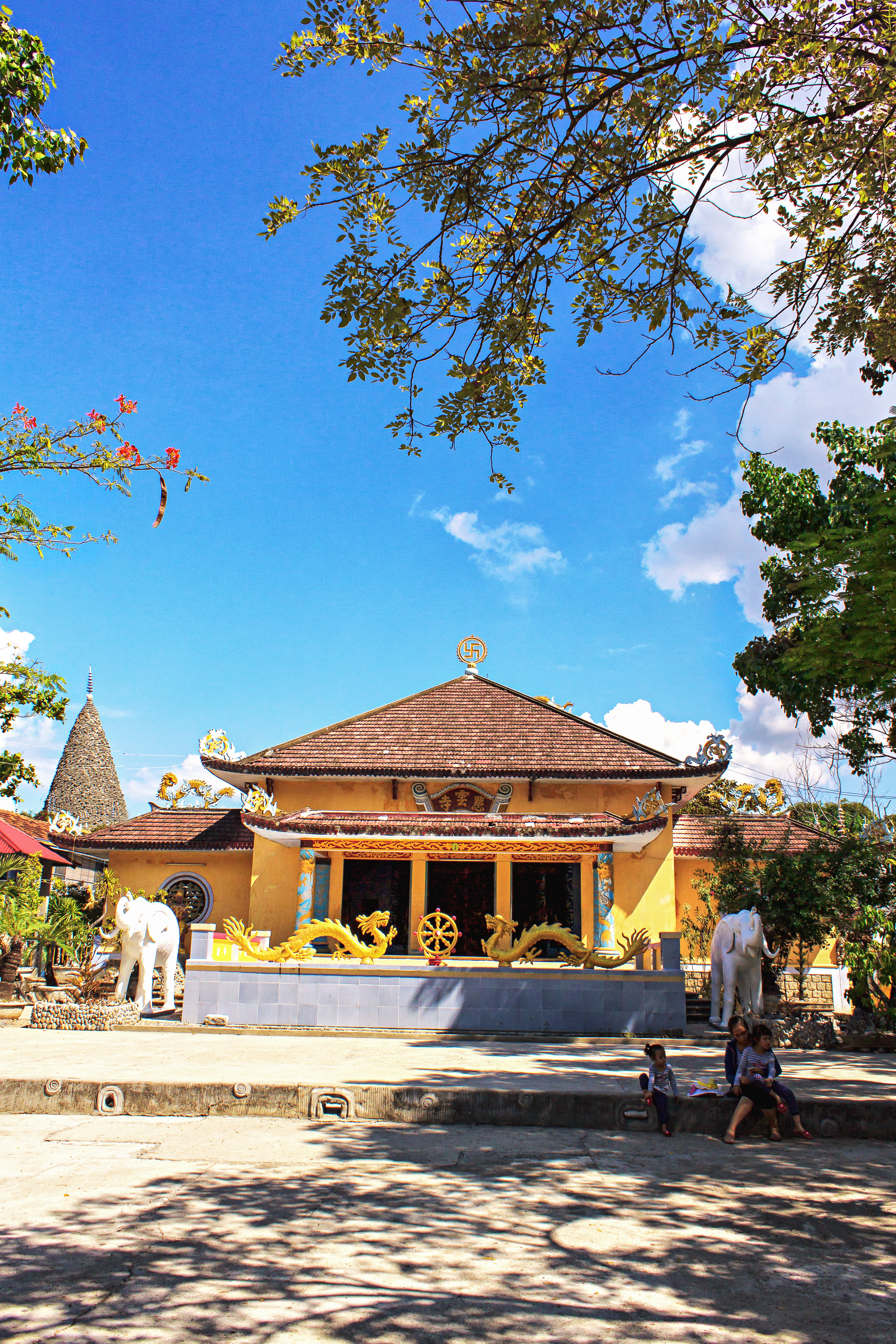 Chánh điện chùa Từ Vân, TP Cam Ranh, tỉnh Khánh Hòa, Việt Nam.